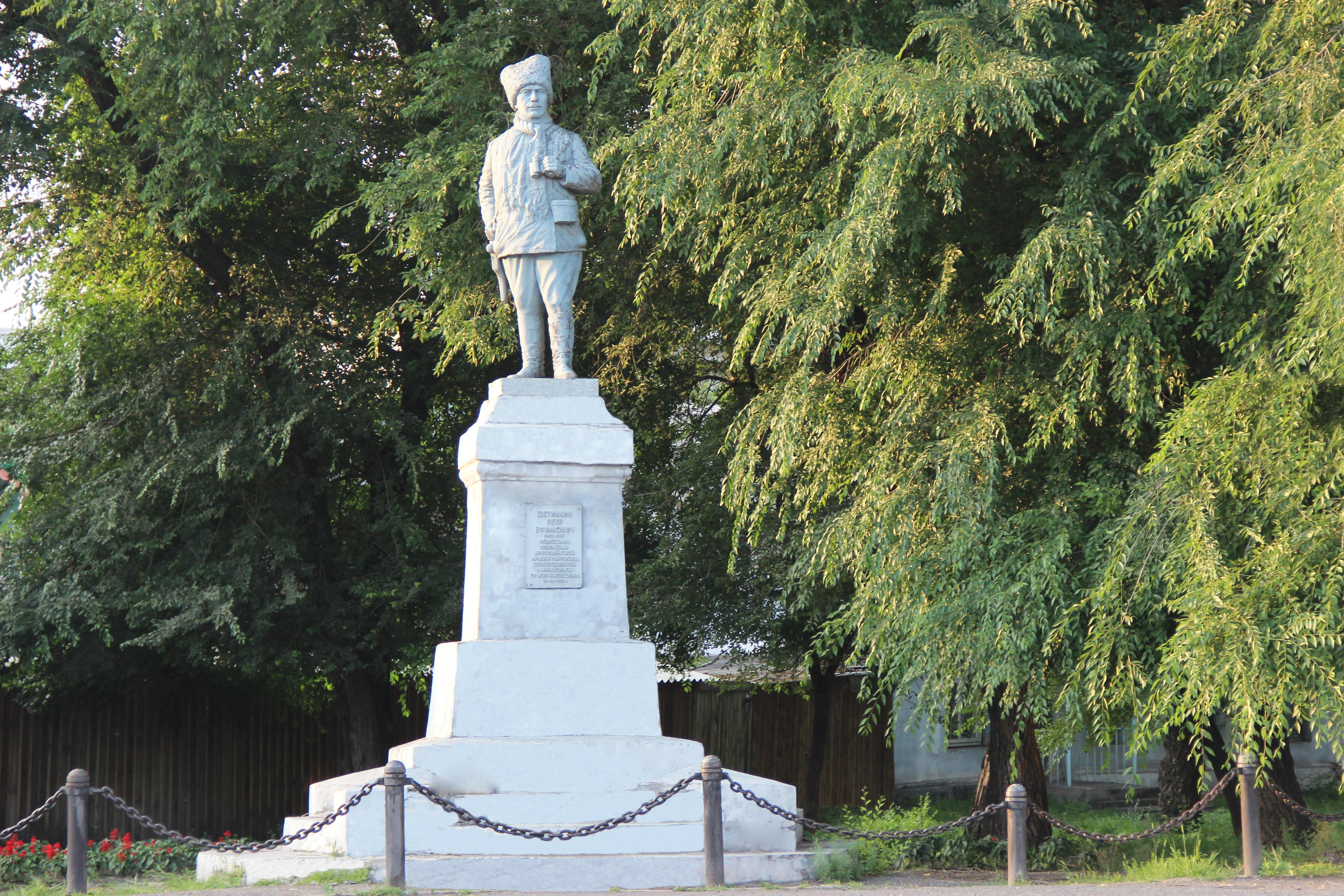 В 1951 г. в городе установлен памятник помощнику главкома партизанской армии П. Е. Щетинкину (скульптор Г. Д. Лавров).